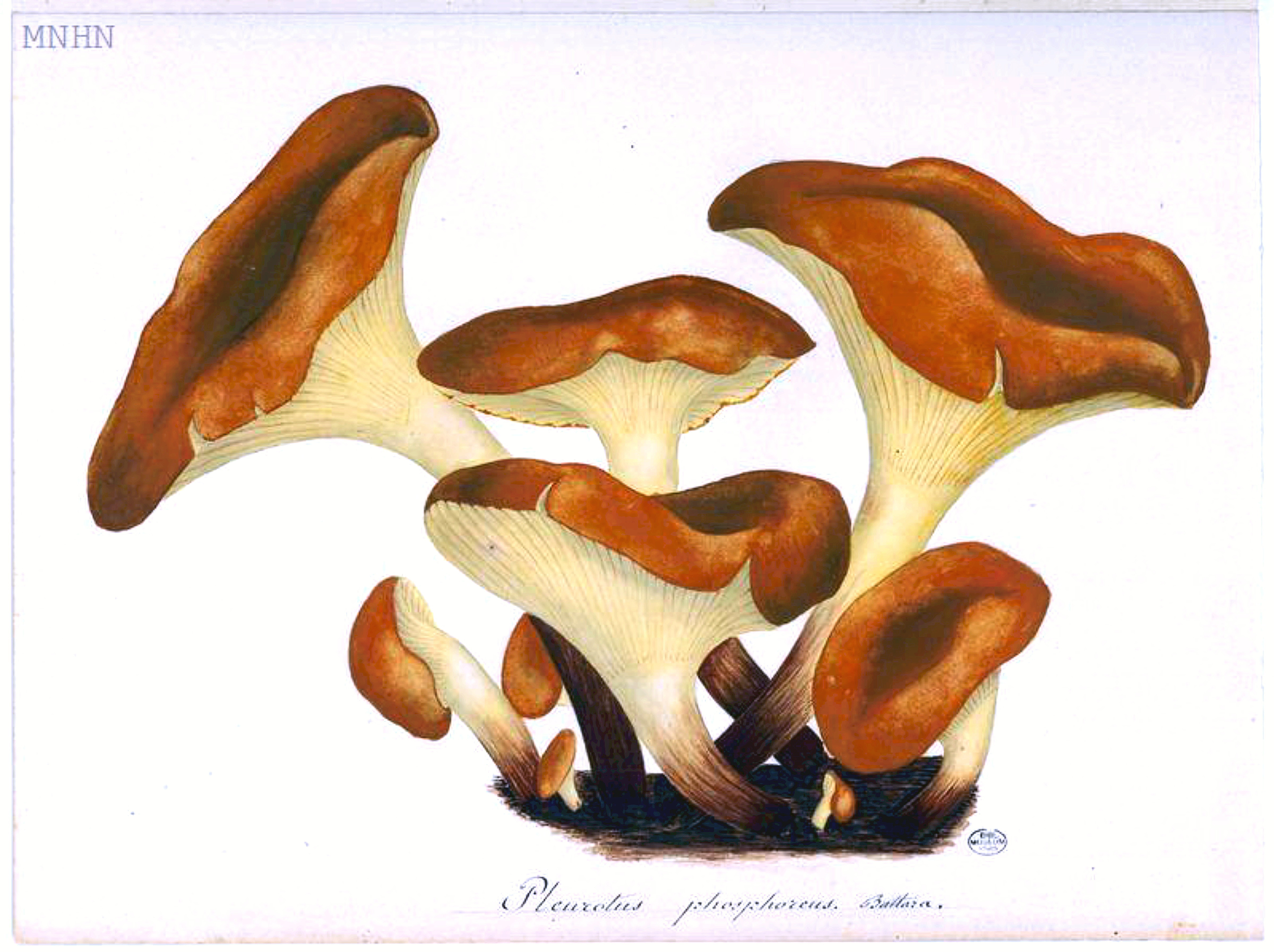 Le port des exemplaires représentés ici évoque des clitocybes plutôt que des pleurotes, mais l'aspect un peu ambigu de cette espèce l'a fait autrefois classer tantôt dans l'un tantôt dans l'autre genre et il en a gardé les noms français. Ils font un peu penser au clitocybe inversé, Lepista inversa, aux lames blanc crème, alors que celles du clitocybe de l'olivier sont jaunâtres à roussâtres, souvent plus foncées encore que sur cette planche. Le clitocybe de l'olivier étant un champignon toxique capable de provoquer des nausées et de violentes diarrhées, les amateurs de Lepista inversa, comestible à chair un peu acidulée, très prisée en cédraie provençale (au point de lui avoir décerné les noms de "chanterelle des cèdres" et de "rousse des cèdres") doivent s'en méfier doublement à cause du risque de confusion avec le redoutable Clitocybe amoenolens. Sa couleur orangée fait parfois confondre le clitocybe de l'olivier avec la girole, Cantharellus cibarius (voir planche 45), qui, pourtant, s'en distingue aisément par ses lames épaisses, sinueuses, espacées, souvent reliées entre elles (car ce ne sont pas de vraies lames mais de simples plis), alors que celles du clitocybe de l'olivier sont fines et serrées. Contrairement à ce qu'indique son nom, le clitocybe de l'olivier vient sur les souches de chênes, châtaigniers et arbustes divers, dont l'olivier. Plutôt méditerranéen en France, il abonde dès le printemps dans le maquis de l'île de Port-Cros, plus rare au nord de la Loire, sans toutefois être exceptionnel. Généralement en touffes, rarement isolé, plutôt au ras du sol, à la base des souches ou en liaison avec des racines mortes, où ses chapeaux jaune safran à orangé roussâtre, lumineux, le font facilement remarquer. C'est aussi l'un des très rares champignons luminescents de nos régions, dont les lames, à l'obscurité, émettent une lumière très semblable à celle des lucioles, parfois suffisamment puissante pour permettre la lecture d'un livre, par exemple.